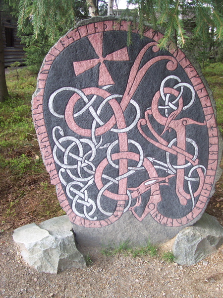 Upplands Runinskrift 871